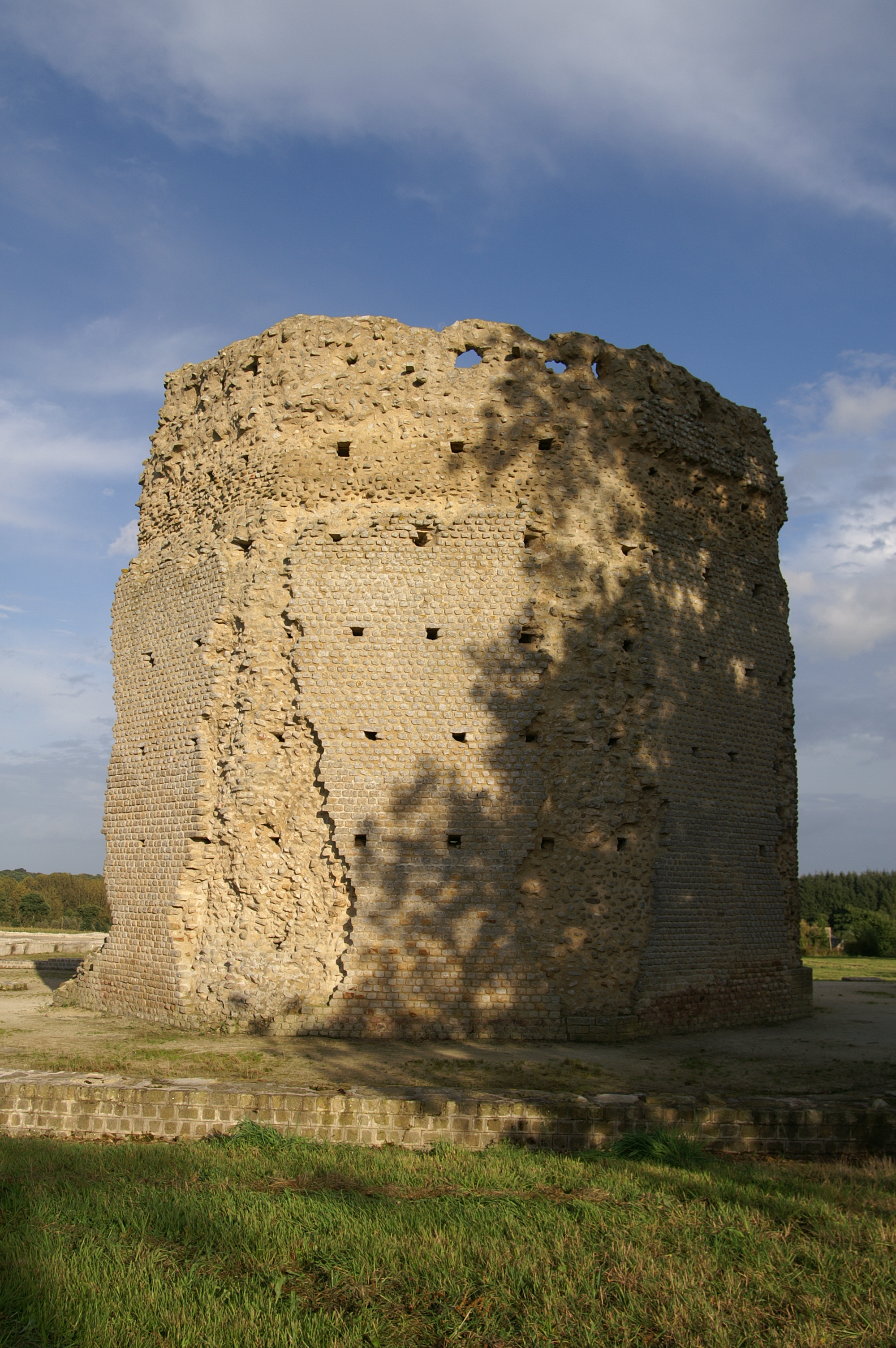 Le temple de Mars à Corseul.